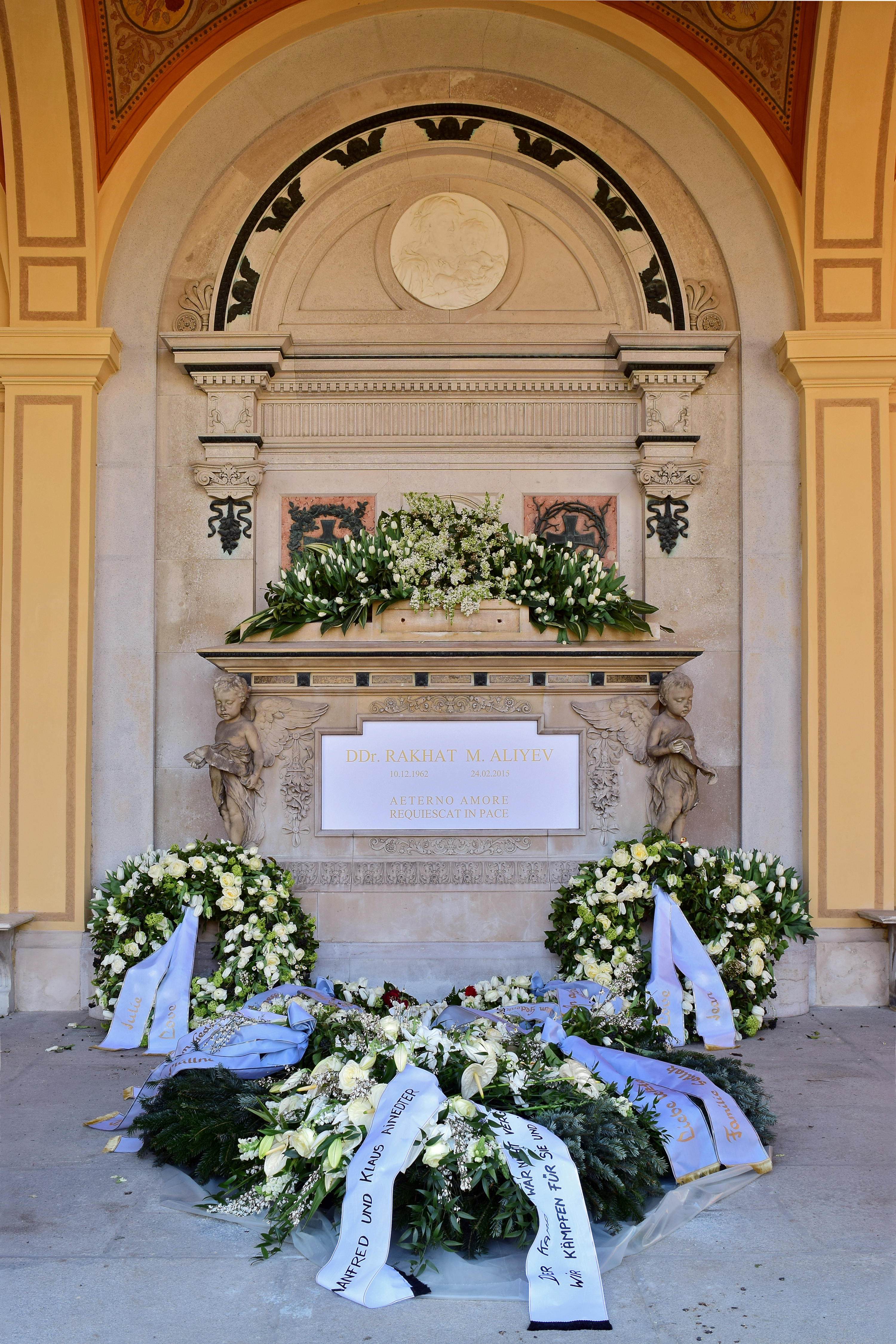 Gesamtanlage, Zentralfriedhof